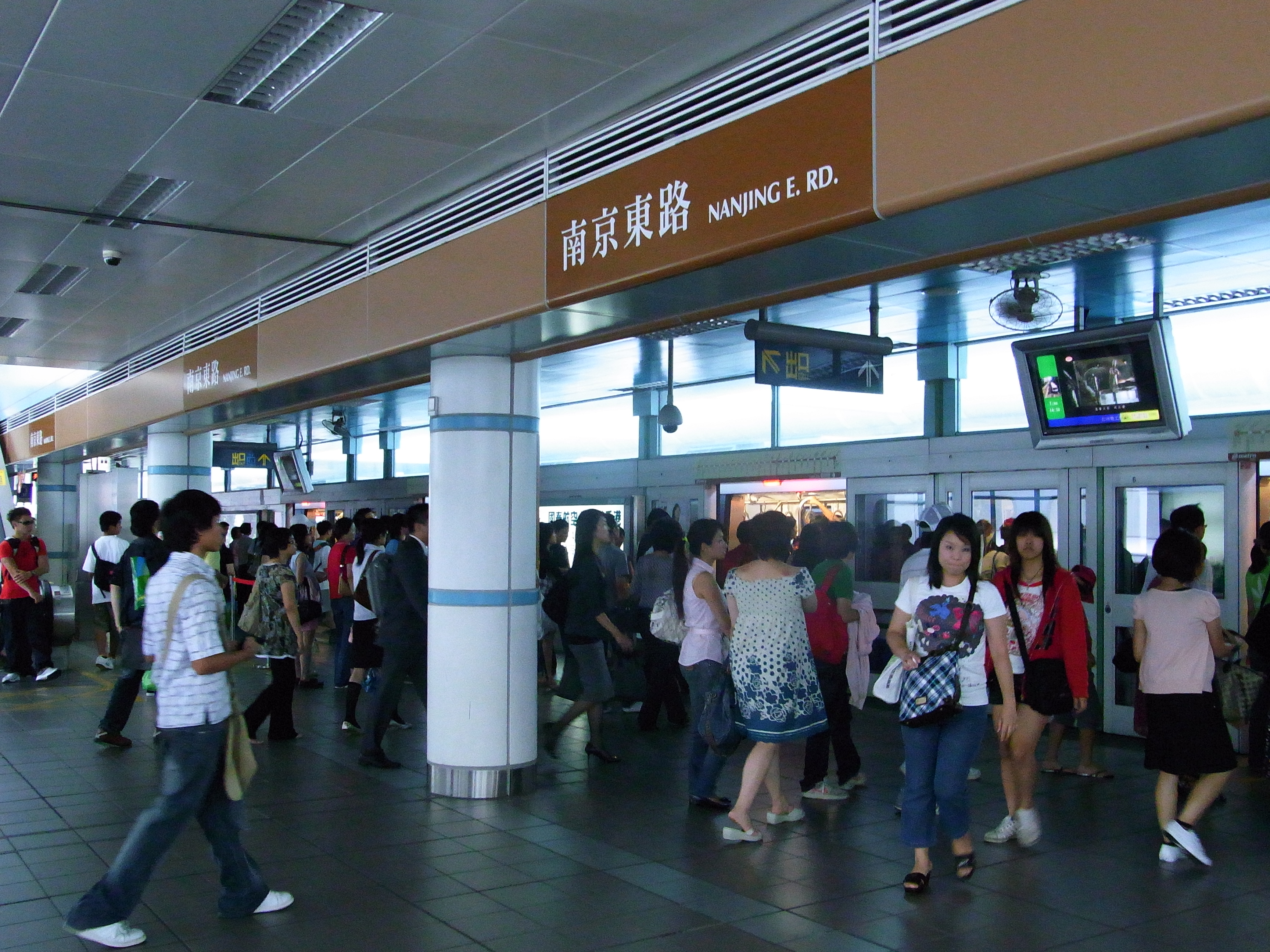 中文（台灣）: 臺北捷運南京東路站棕線月台層。